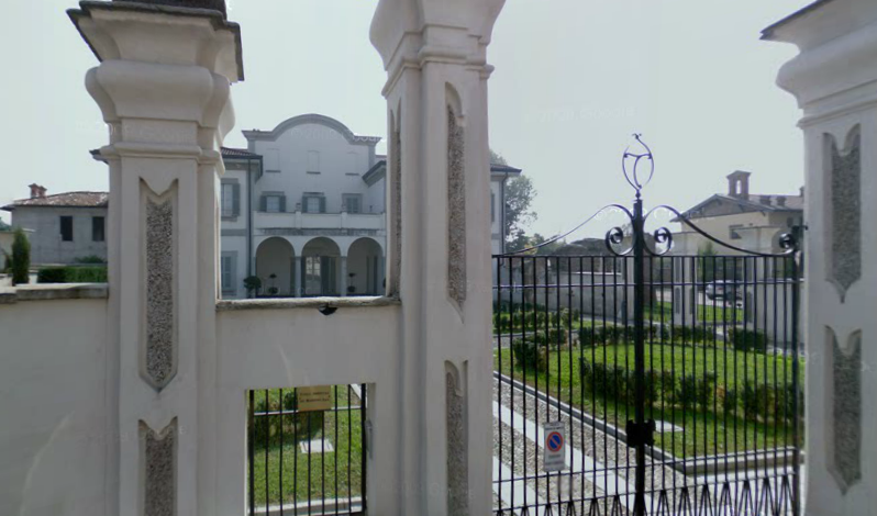 Villa Terzaghi a Robecco sul Naviglio (MI) - Italy